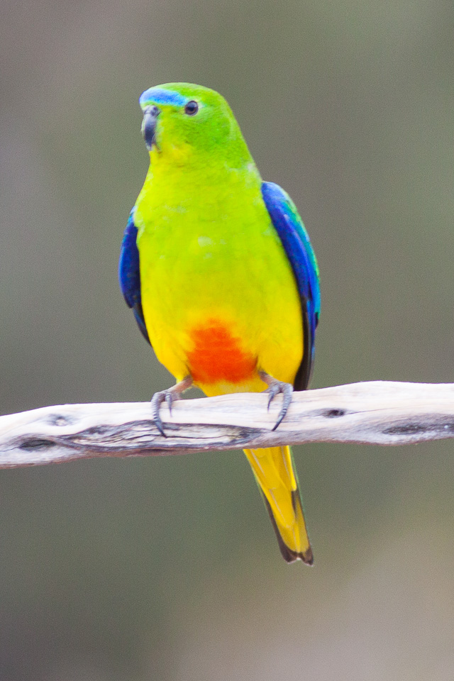 Melaleuca,Tasmania